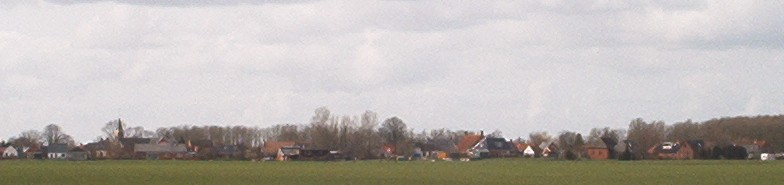 zelf gemaakte foto voor het publiek domein van Wikipedia. Martink.